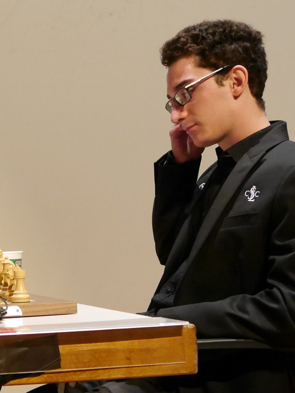 Fabiano Caruana, Dortmunder Schachtage 2016.